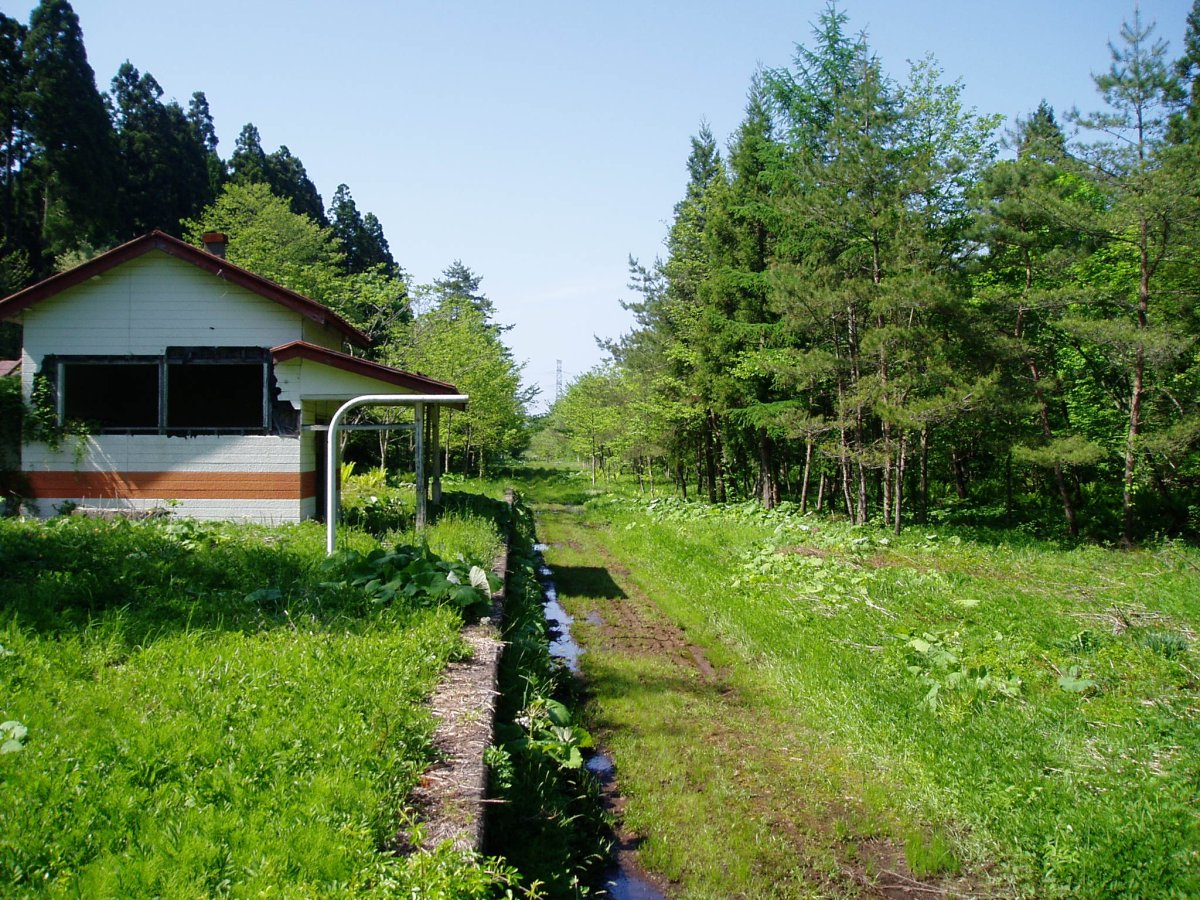 大畑線樺山駅跡